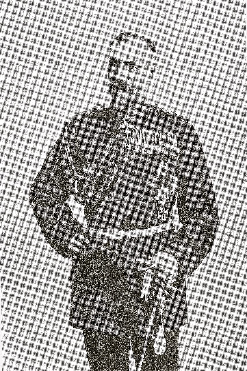 Walther Bronsart von Schellendorff (1833-1914), prussian general and minister of war